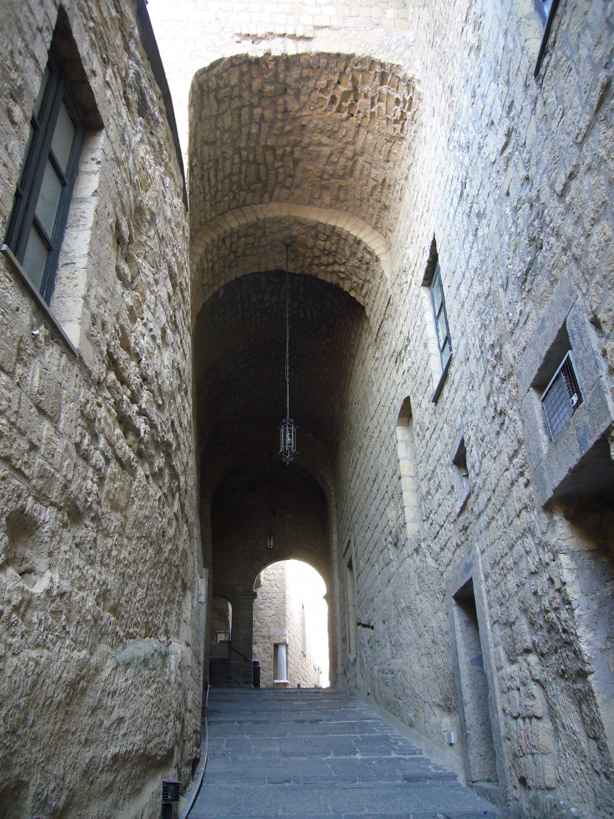 Napoli, Castel dell'Ovo: interno